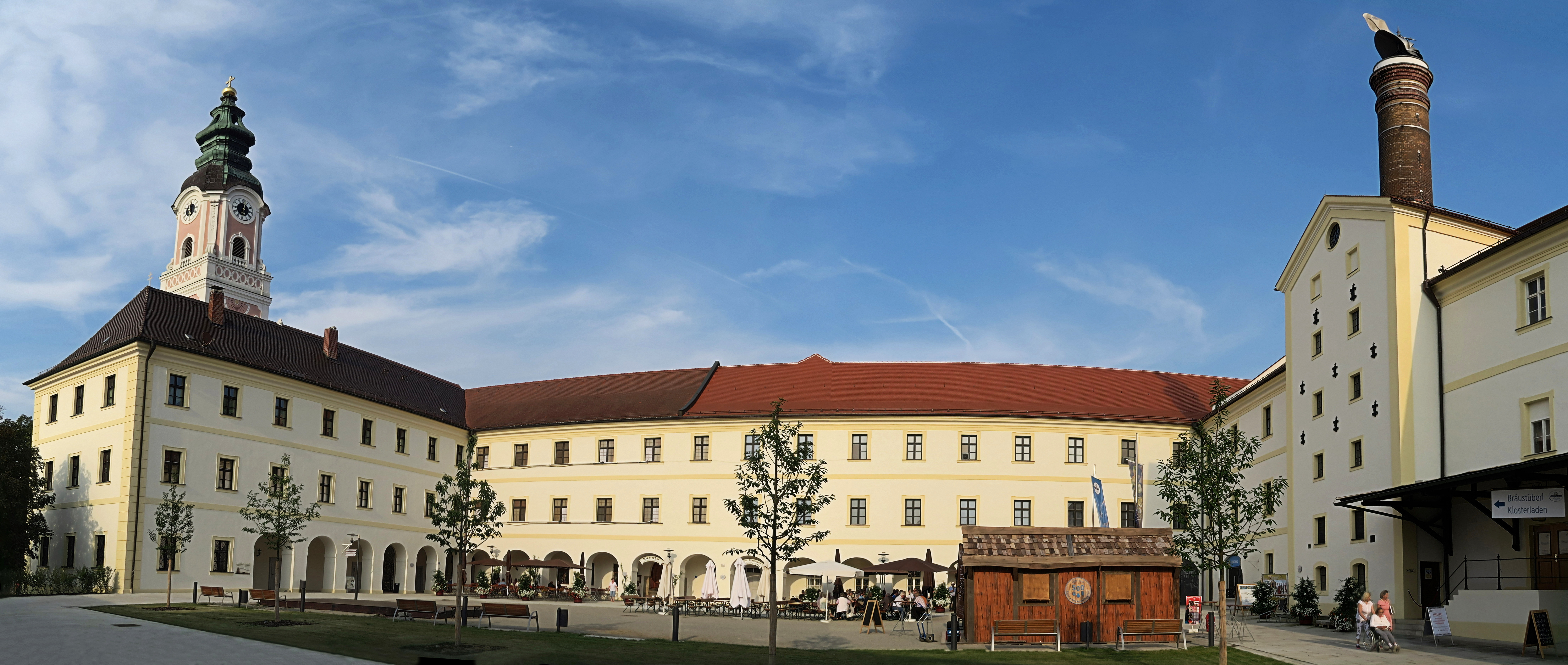 Deutschland, Bayern, Niederbayern, Landkreis Passau, Gemeinde Aldersbach, Klosterhof mit ehem. Klosterabteikirche "Mariä Himmelfahrt"